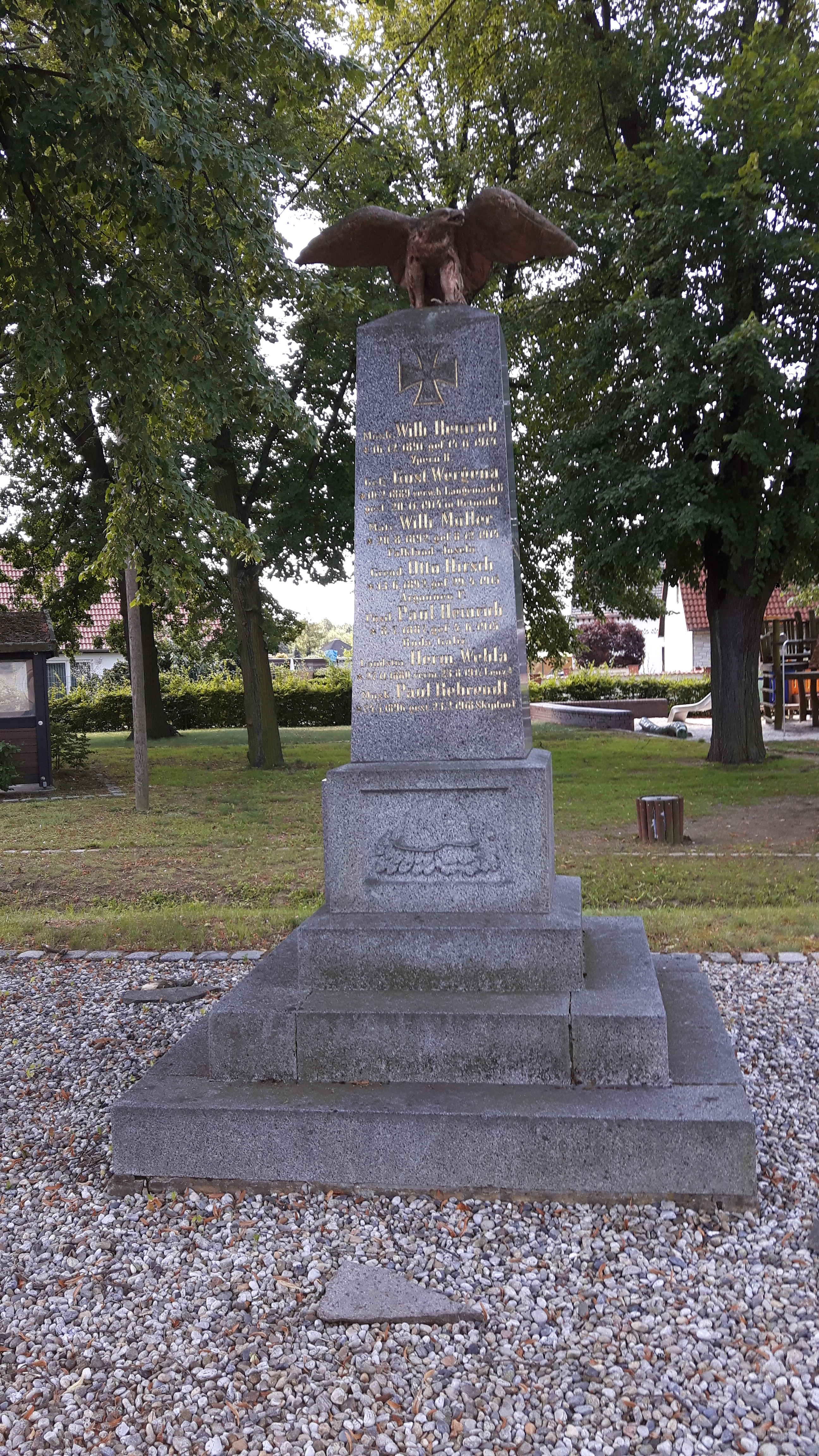 Kriegerdenkmal in Lübbenau/Spreewald, OT Klein Beuchow.